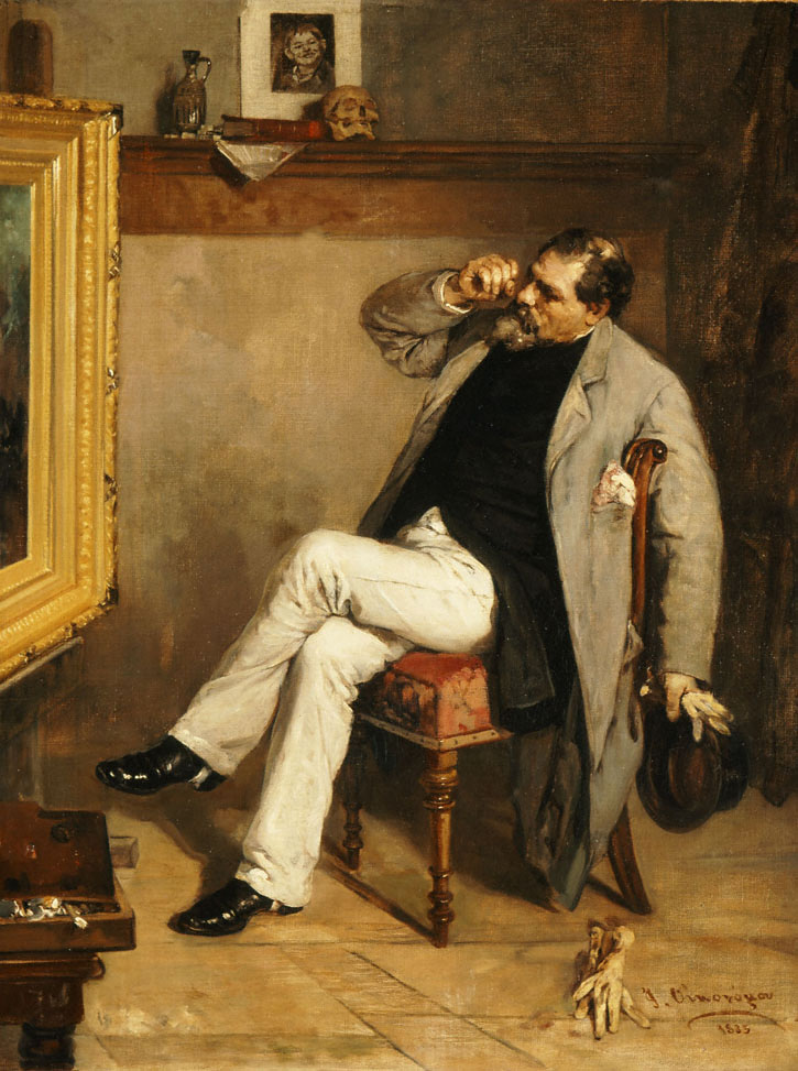 "Der Kunstkritiker", Werk des griechischen Künstlers Ioannis Oikonomou